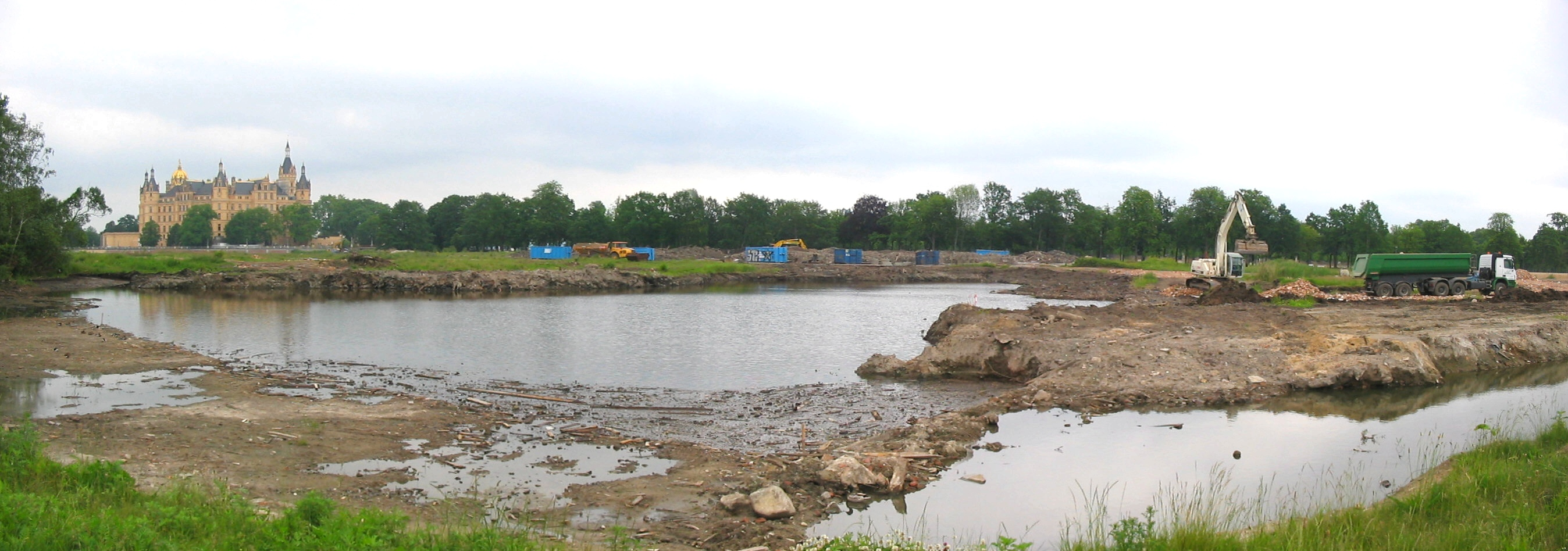 Arbeiten zur Umgestaltung des Burgsees in Schwerin anlässlich der Bundesgartenschau 2009, links: das Schweriner Schloss